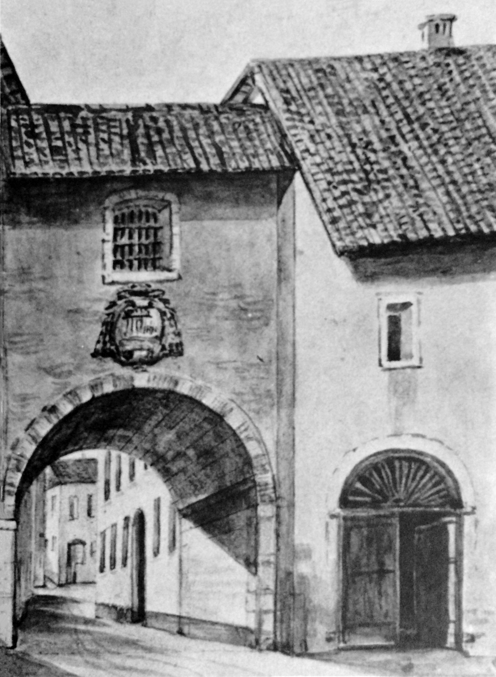 La Porta di sotto (Legnano) in un acquarello del 1875 di Giuseppe Pirovano (da Memorie della Società Arte e Storia n°15, tav. 1)